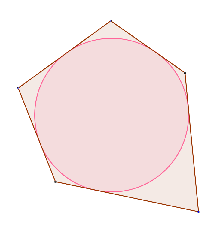 файл создан в среде GeoGebra